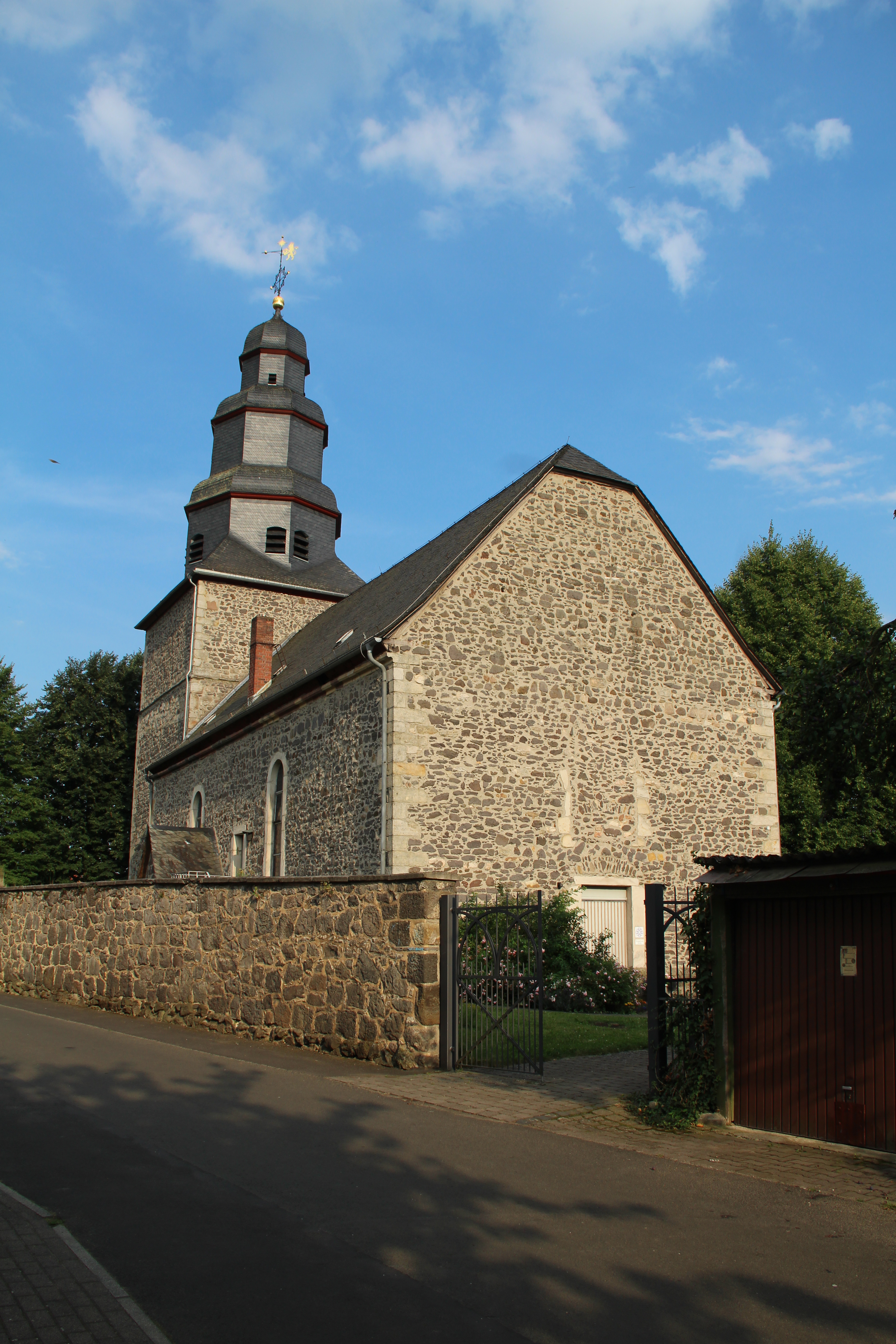 Ev. Kirche